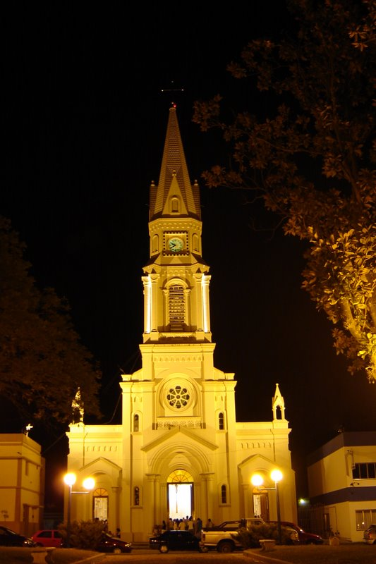 Fachada de la Iglesia Sagrado Corazón de Jesús de Urdinarrain, Entre Ríos.